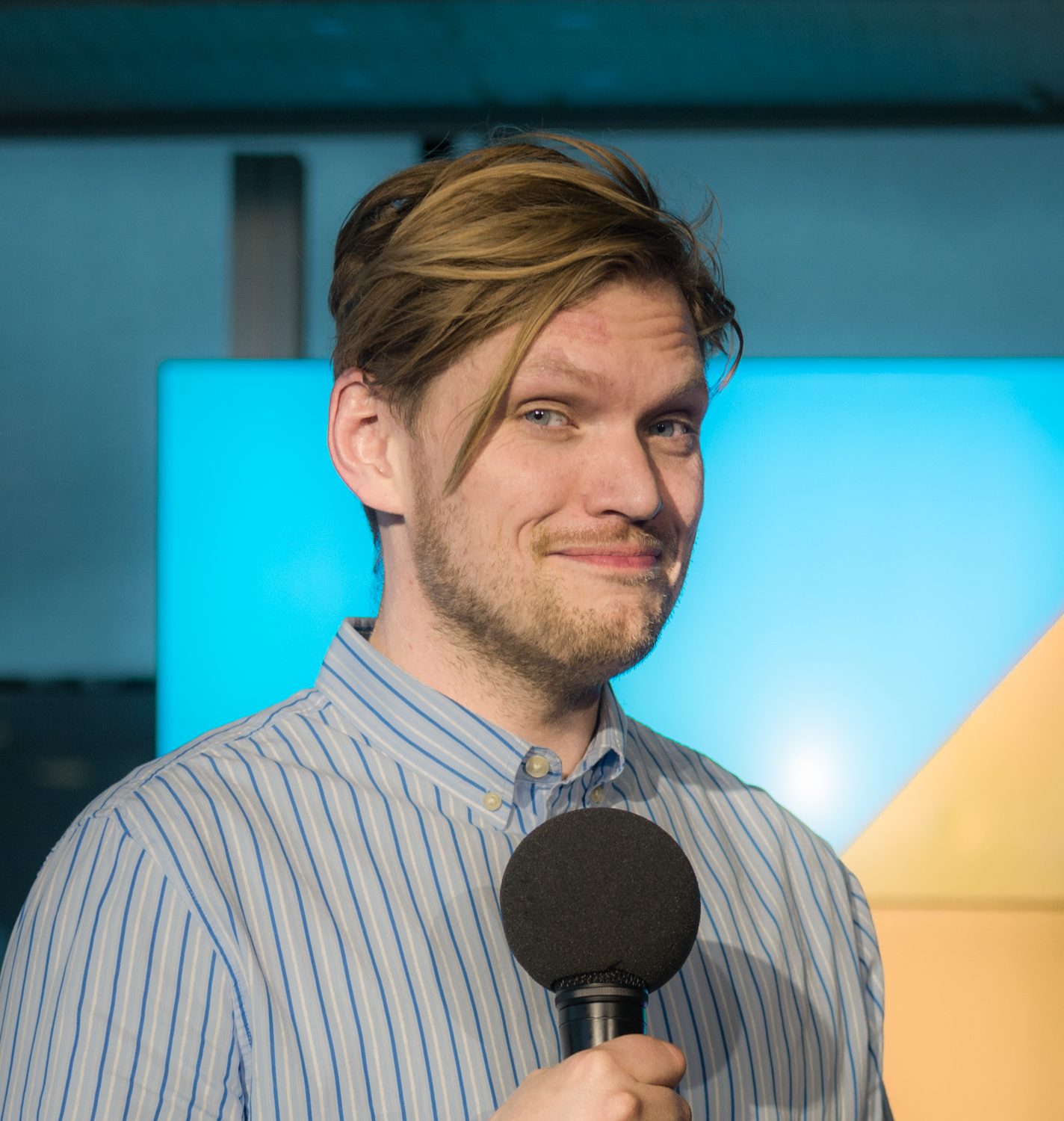 Henrik Torehammar under en inspelning för Sveriges Radio P1 på Kulturhuset Stadsteatern i Stockholm den 24 april 2018.